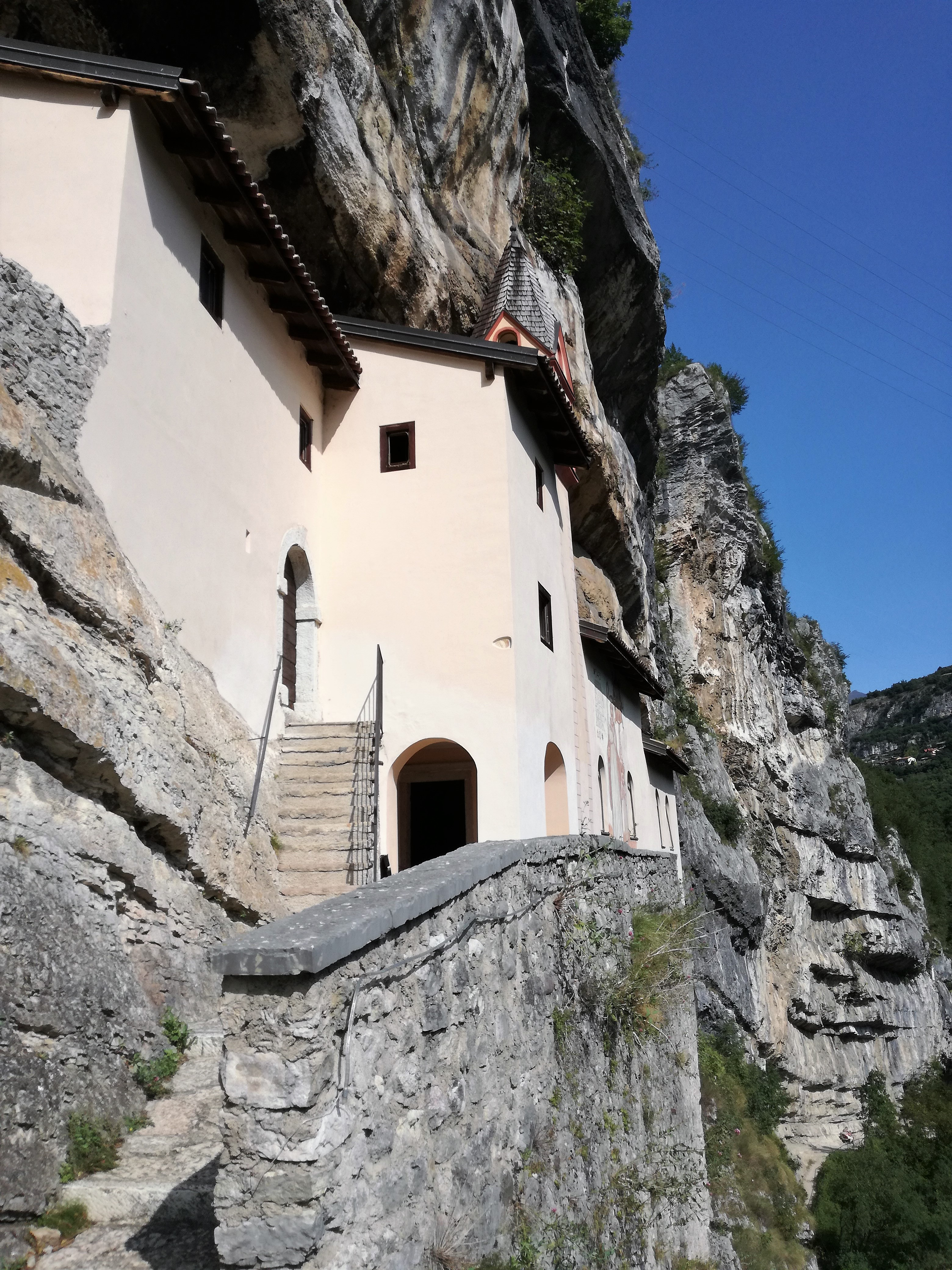 San Colombano